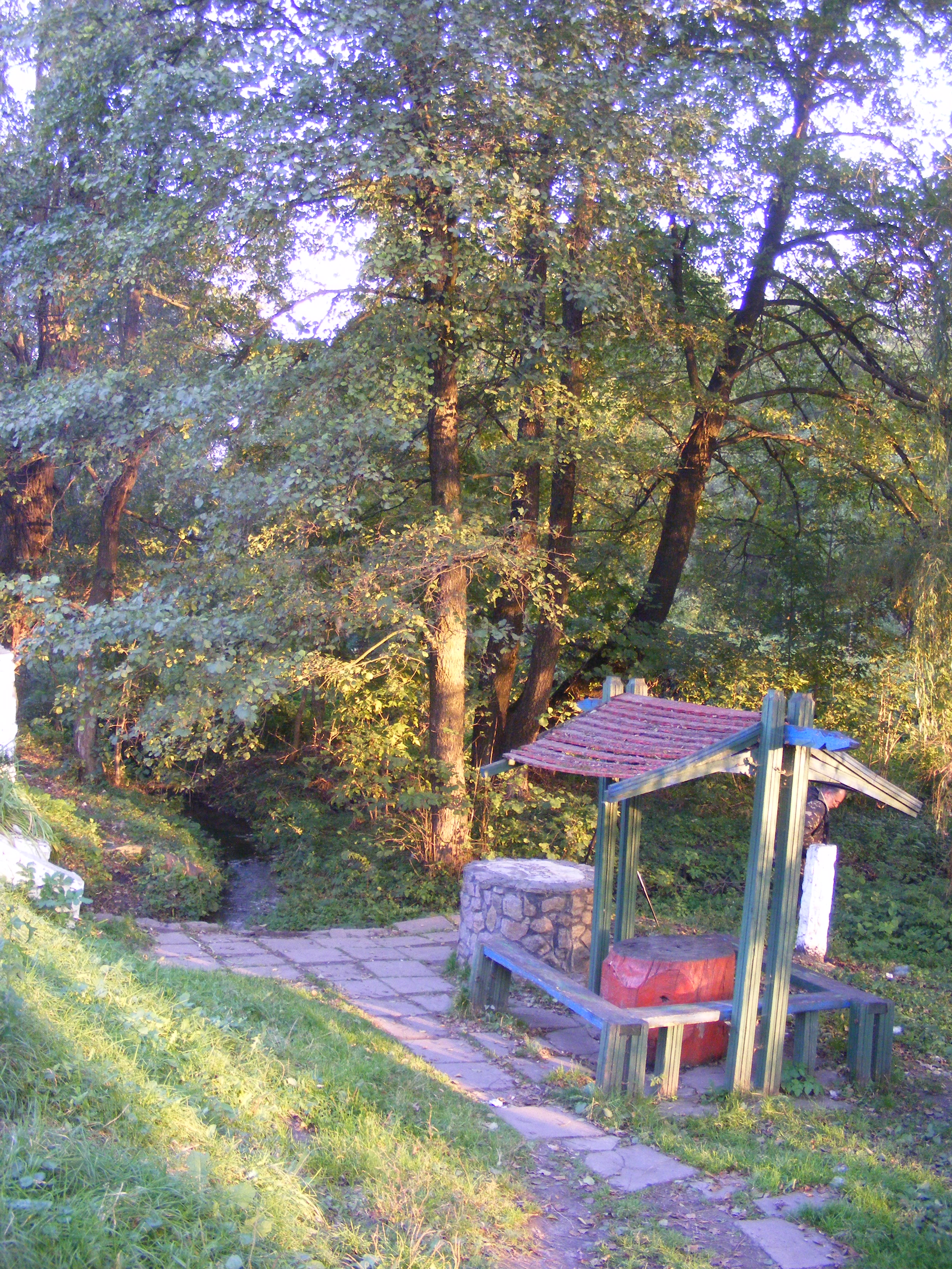 Джерело «Огруд», Савранський р-н, Дубинівська сільська рада, с. Дубинове